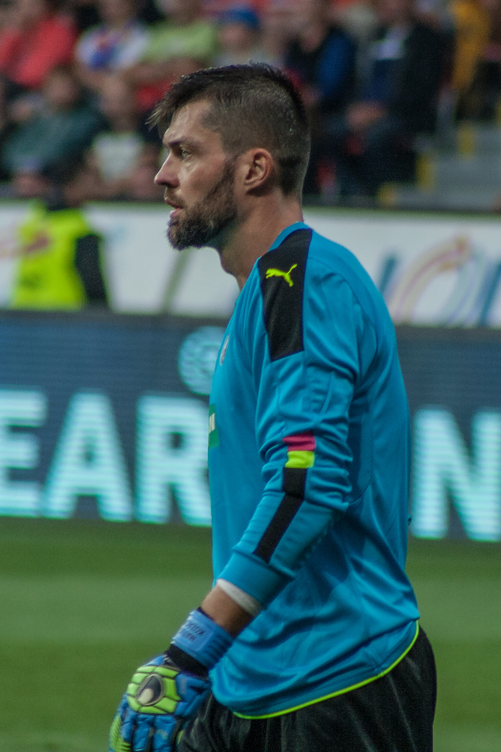 Matůš Kozáčik v roce 2016